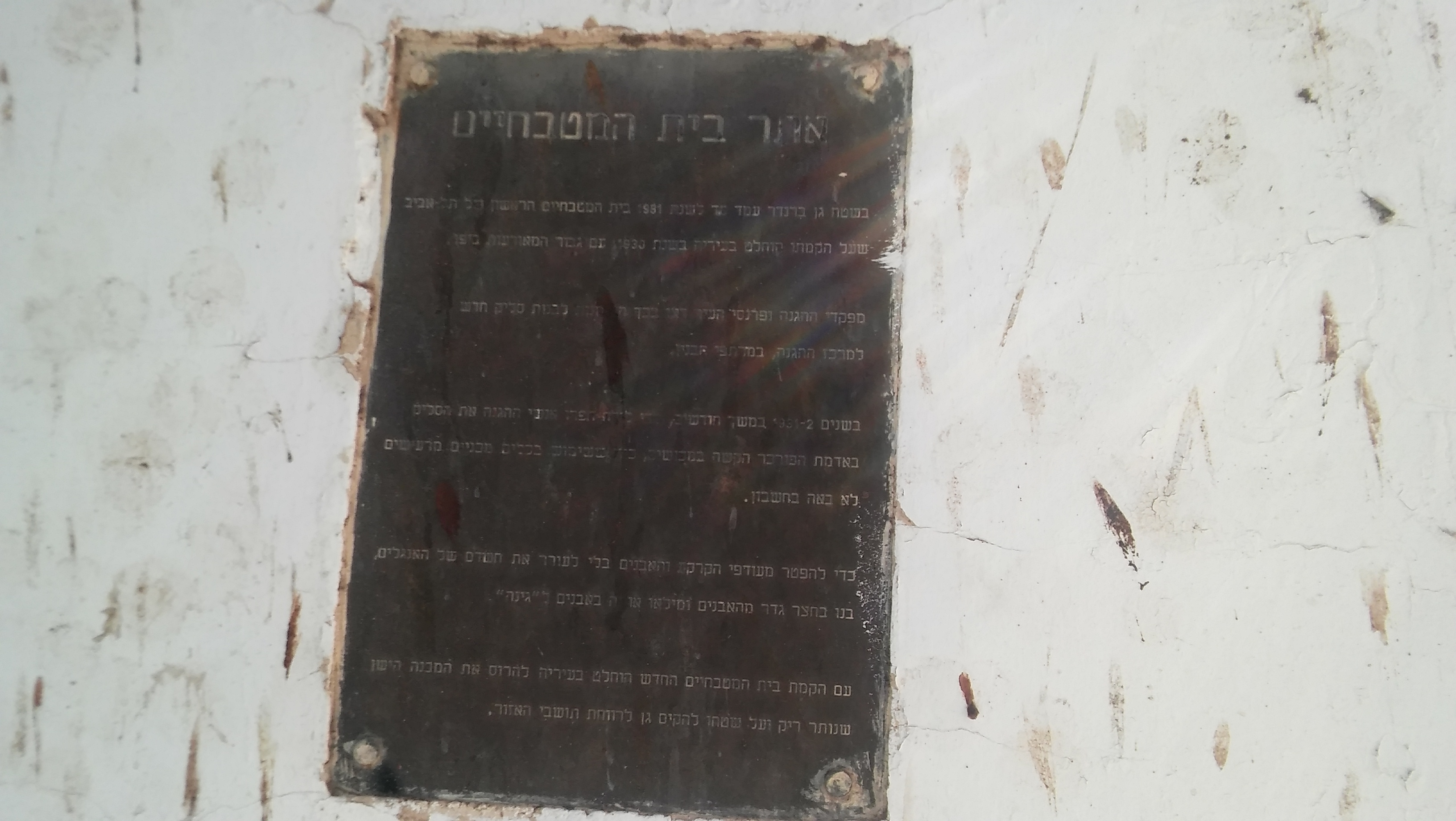 בית המטבחיים הישן של תל אביב